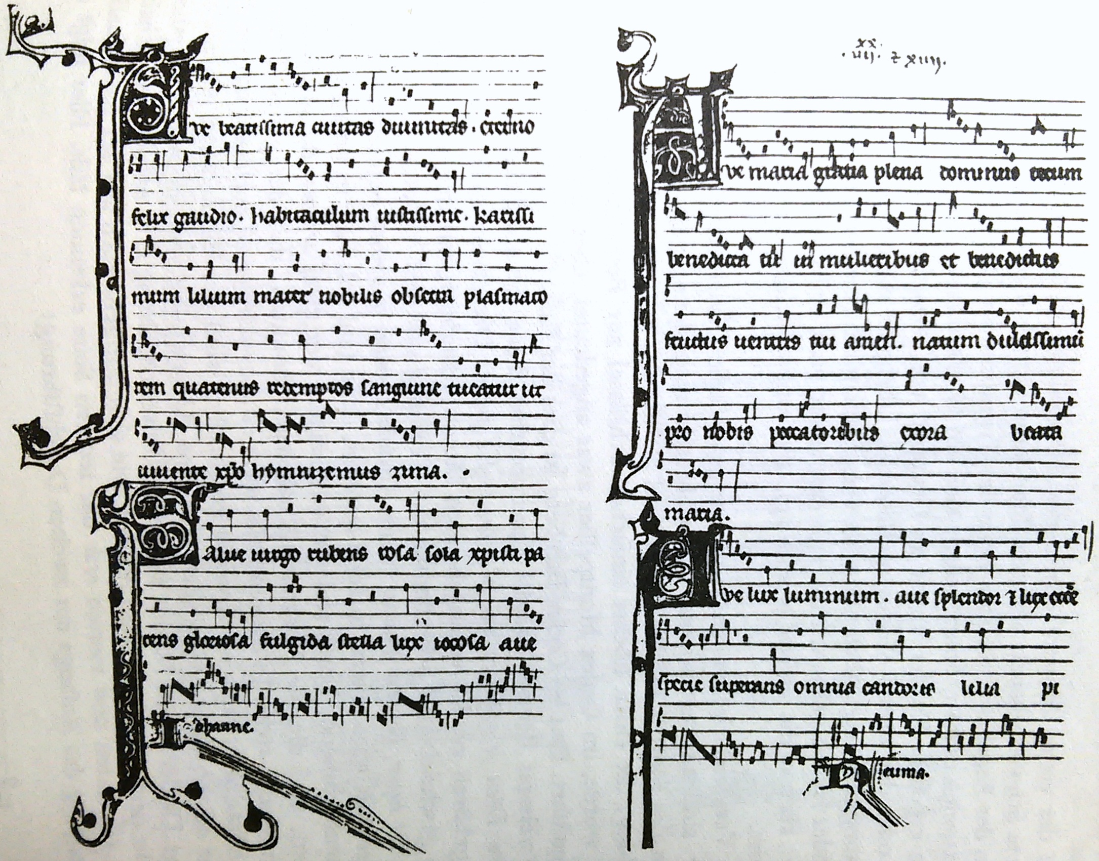 Montpellierský kodex